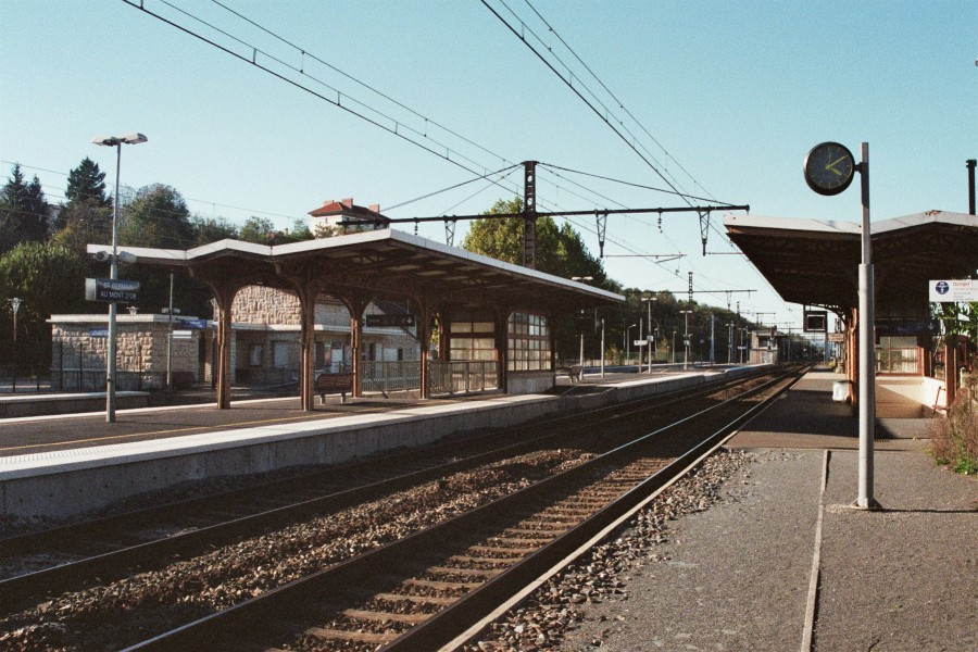 La gare de Saint-Germain au Mont d'Or,vue générale